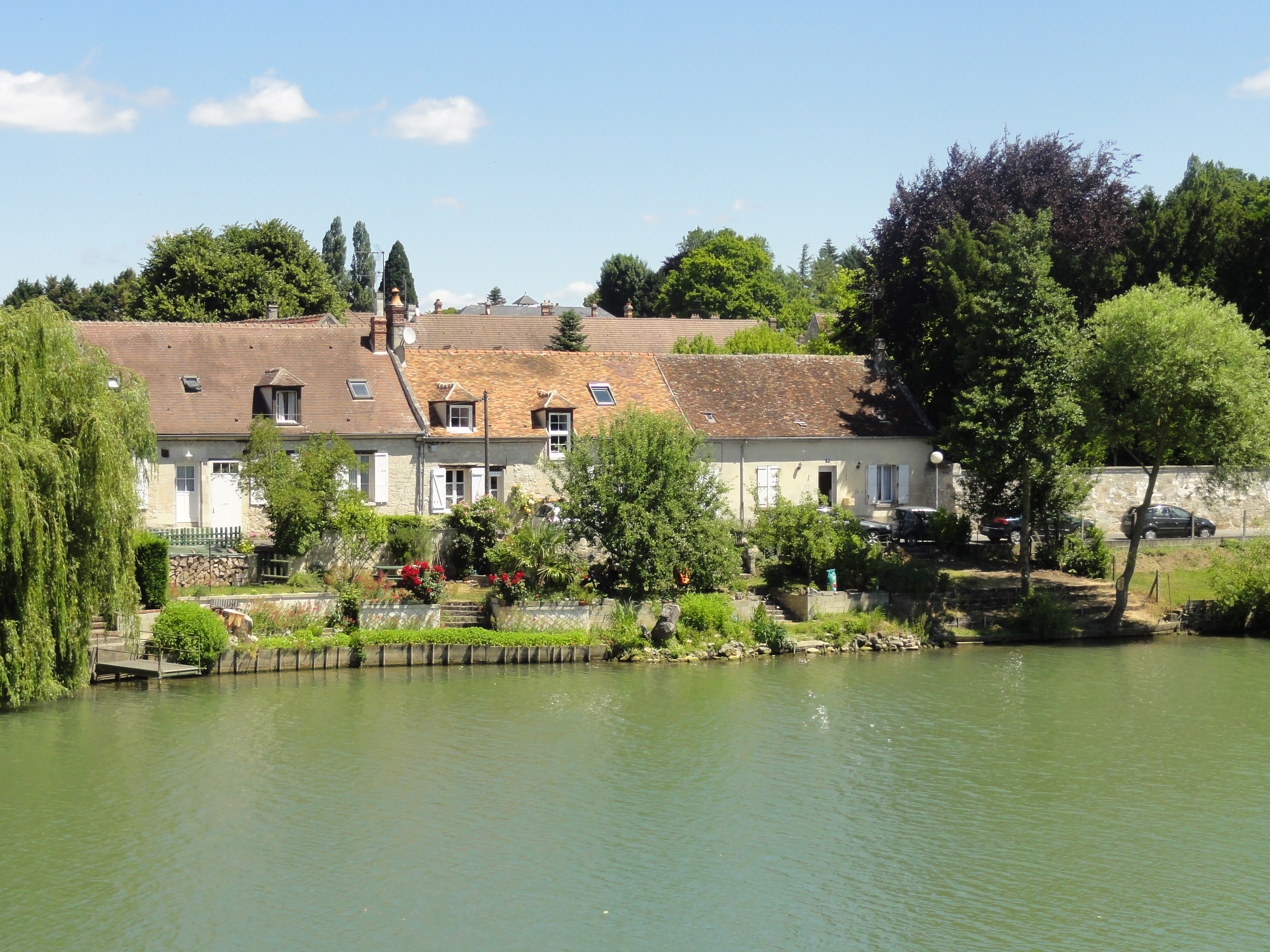 Rue de l'Aisne.